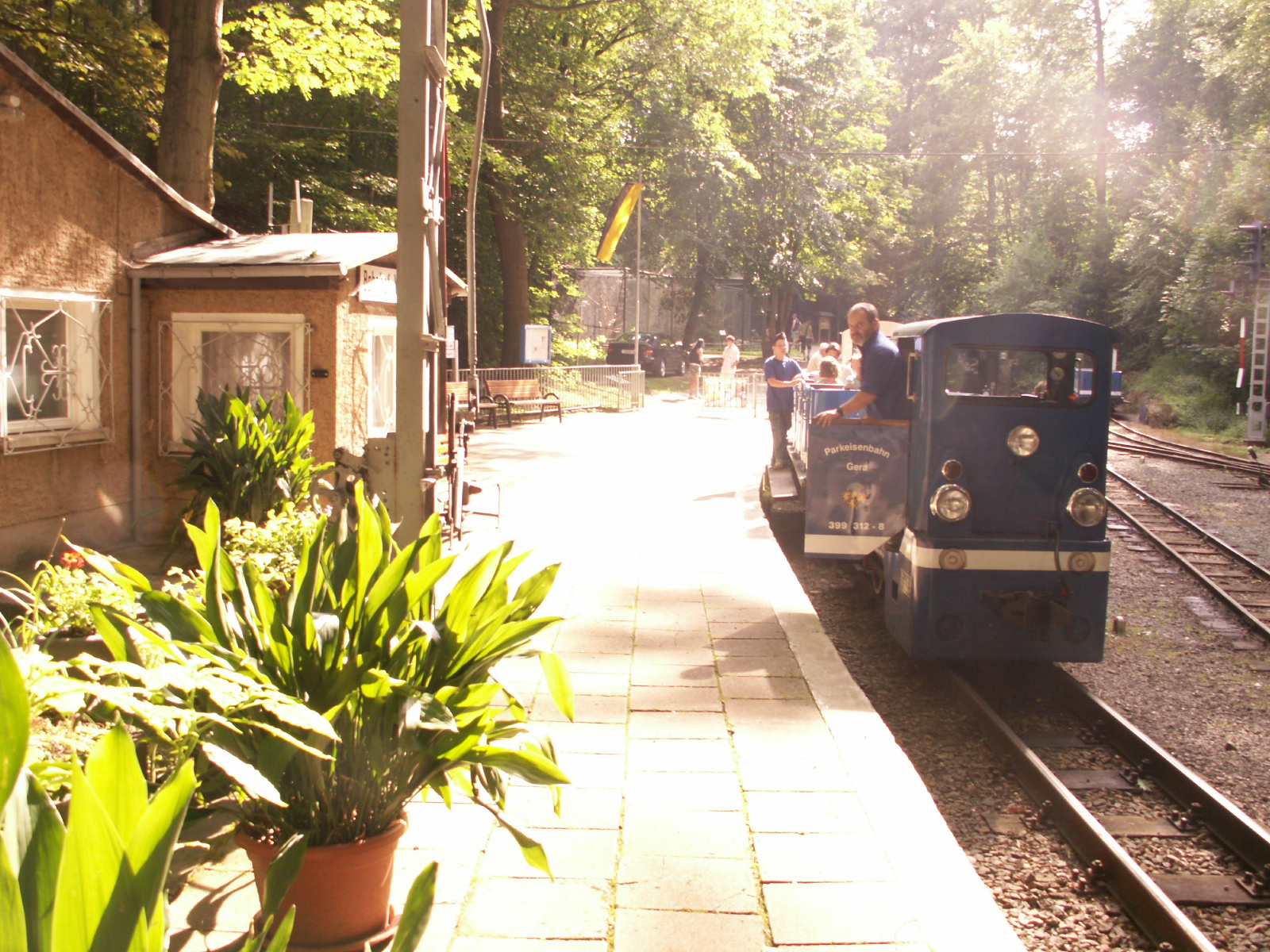 Parkbahn Gera